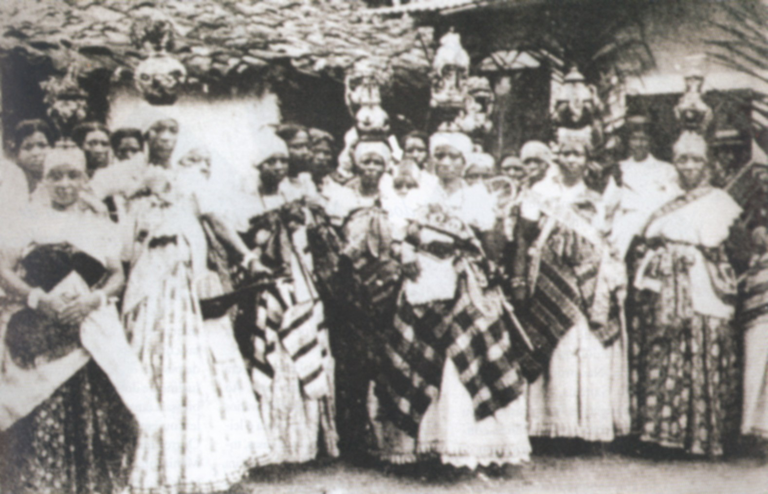 Mãe Menininha do Gantois (in age 8 years) - Bahia - Ritual para Oxóssi.